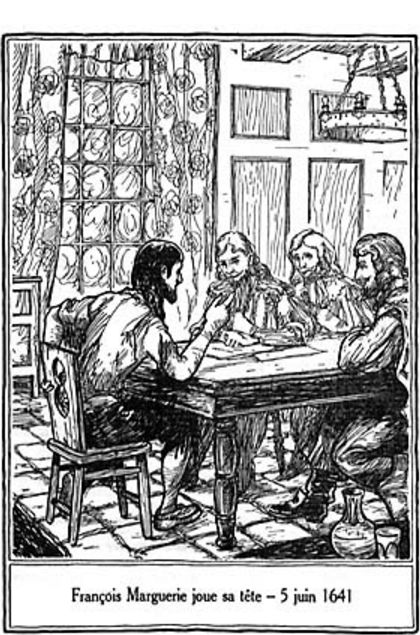 François Marguerie joue sa tête